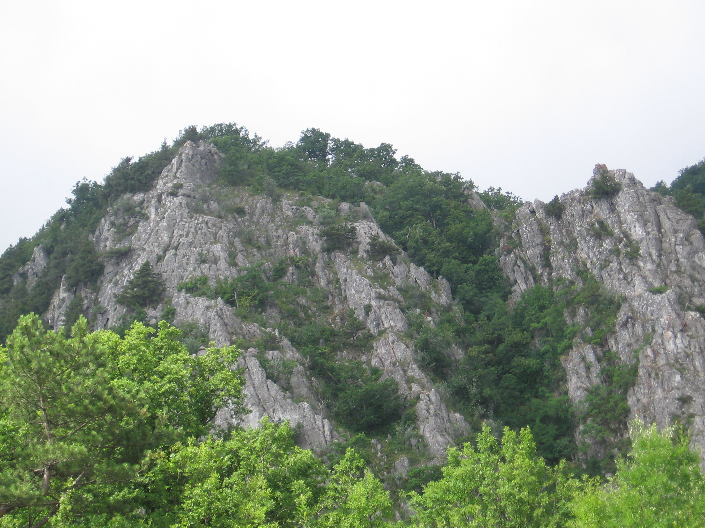 Скеля_Подпорічел: Фото